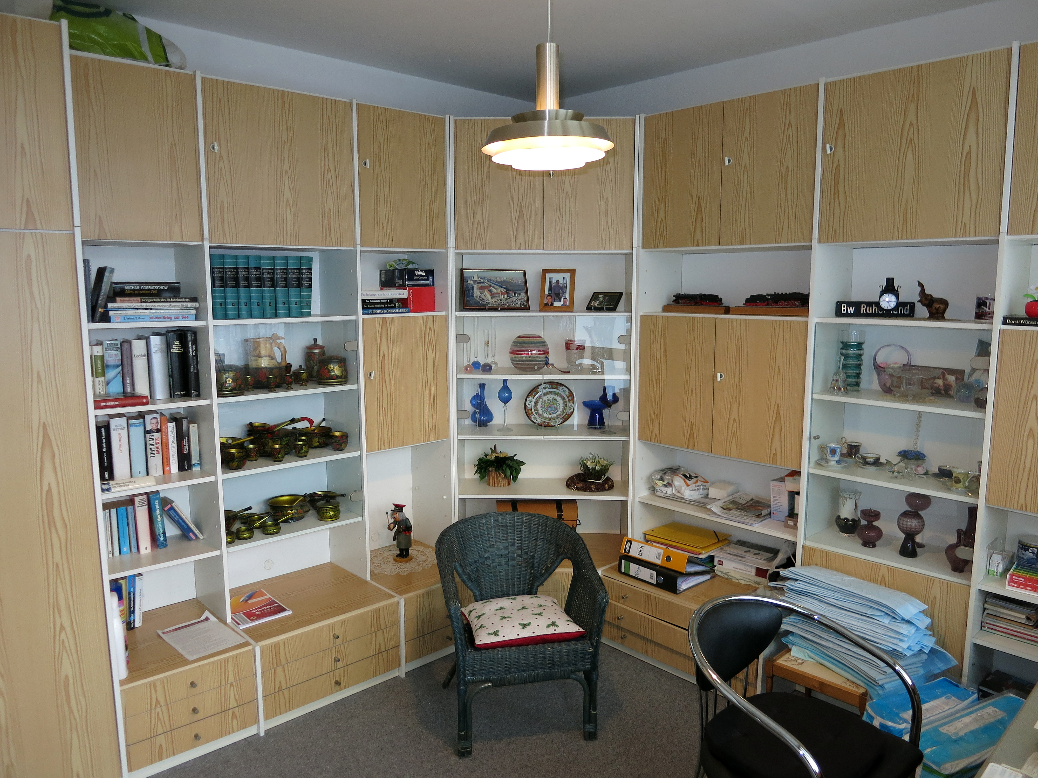 Ecklösung Schrankwand, Systemmöbel Möbelprogramm Deutsche Werkstätten (MDW) Hellerau MDW 80, gekauft ca. 1980 ca. 4.000 Mark, Pendelleuchte vom VEB Metalldrücker Halle; beides jetzt in Sammlung Kunstmuseum Moritzburg Halle